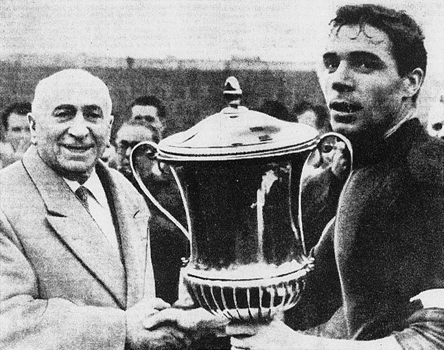 Bologna, stadio Comunale, 4 aprile 1962. Da sinistra: il presidente e il capitano del Bologna FC, rispettivamente Renato Dall'Ara e Mirko Pavinato, con il trofeo della Coppa Mitropa 1961 vinta dai rossoblù superando in finale i cecoslovacchi dello Slovan Nitra (3-0).